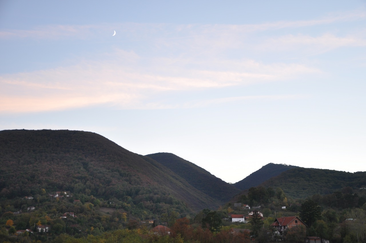 Планина Јелица